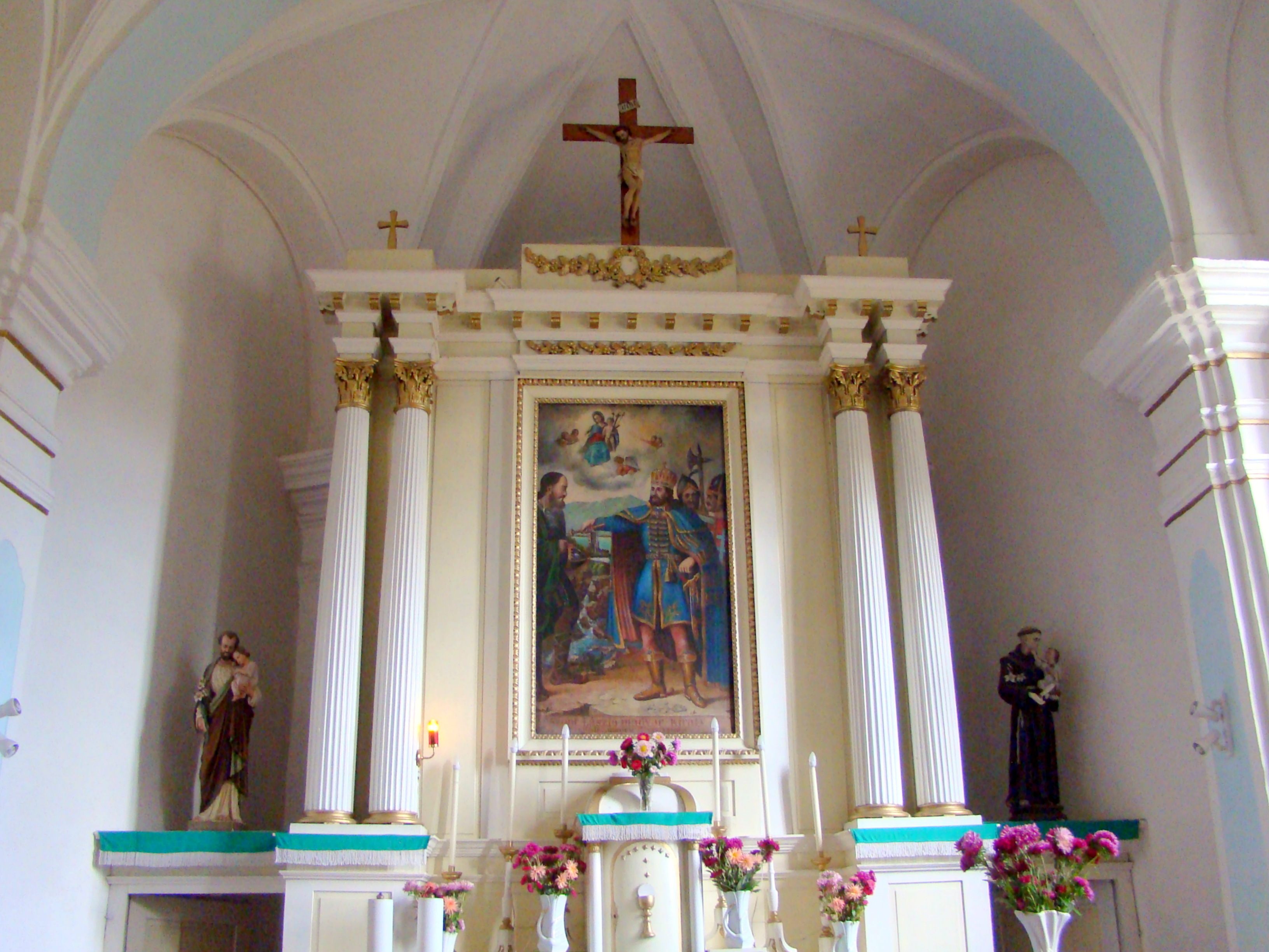 Biserica romano-catolică „Sf. Ladislau” sat aparținător Lunga; municipiul Târgu Secuiesc Str. Principală 351 sec. XV, transf. sec. XVIII, 1821 01